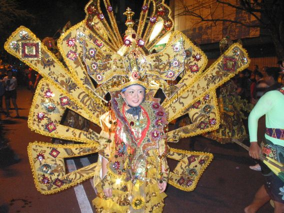 Karnaval Batik Solo 2011